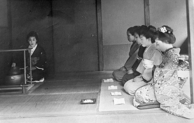 " 5 Uhr-Tee " in Japan ! Die Teezubereitung in Japan wird heute noch nach altüberlieferter Tradition vorgenommen. Die Aufnahmen zeigen die feierliche Stimmung einer Tee-Zeremonie beim "5 Uhr-Tee" in Japan. Japanerinnen in hockender Stellung erwarten die Zubereitung des Tees. Als besondere Höflichkeit wird es angesehen, dass man während der Zubereitung des Tees die Schönheit der Teeservice lobt, da das Porzellan meist alter Herkunft ist.